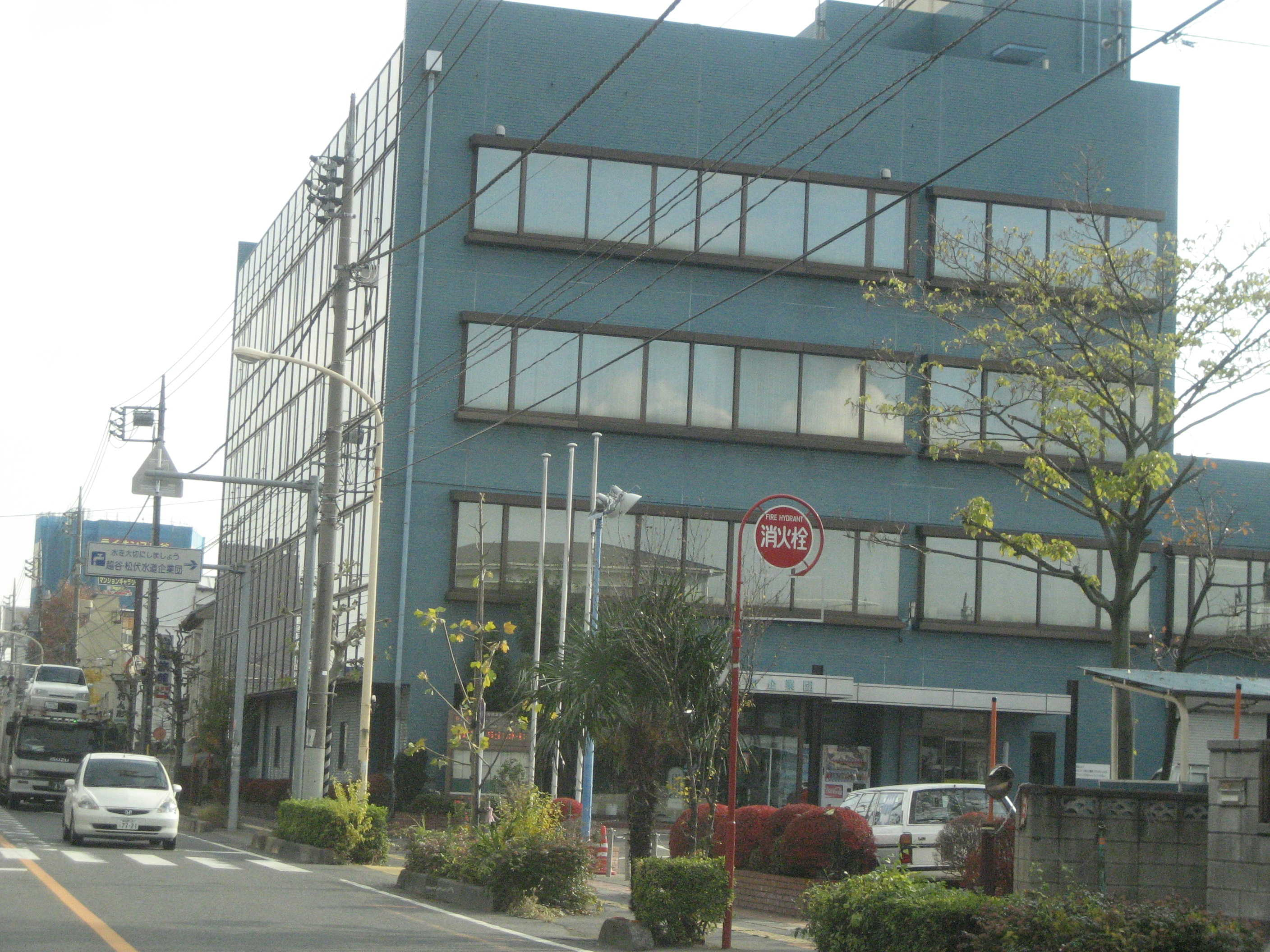 越谷松伏水道企業団